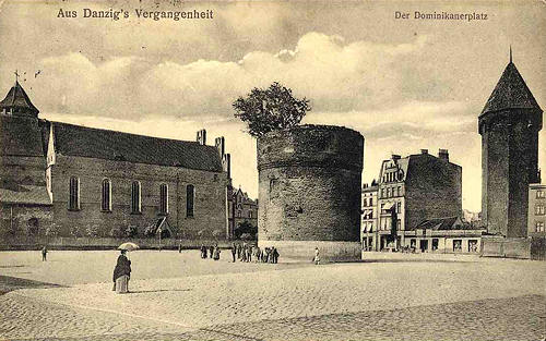 Plac Dominikański w Gdańsku: po lewej kościół Św. Mikołaja, w środku nieistniejąca Baszta Dominikańska zwana "Donicą", po prawej wieża Jacek.